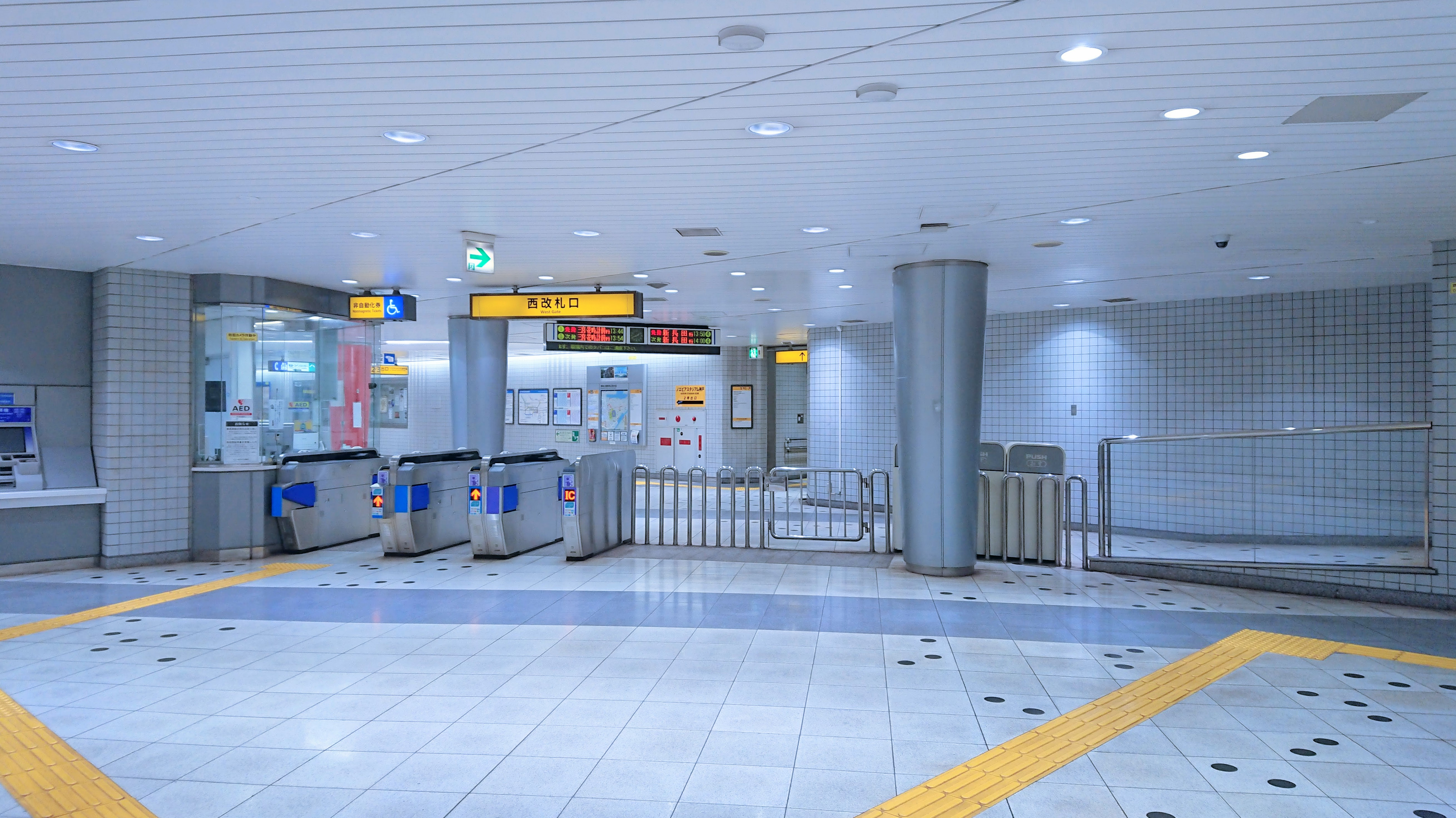 神戸市交通局（神戸市営地下鉄）海岸線 K07 御崎公園駅 西改札口 改札内より